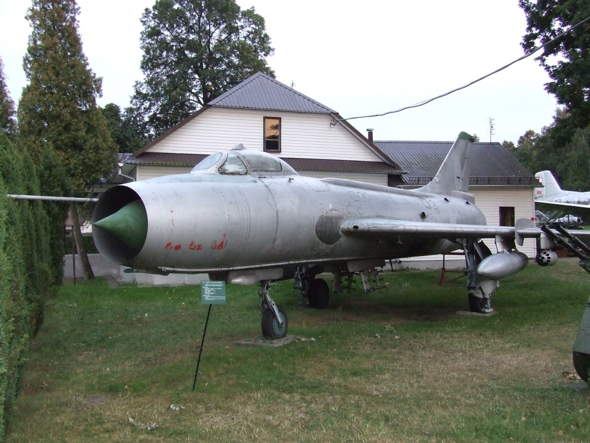 Su-7BKL, Muzeum Orła Białego (White Eagle Museum, Skarżysko-Kamienna, Poland)